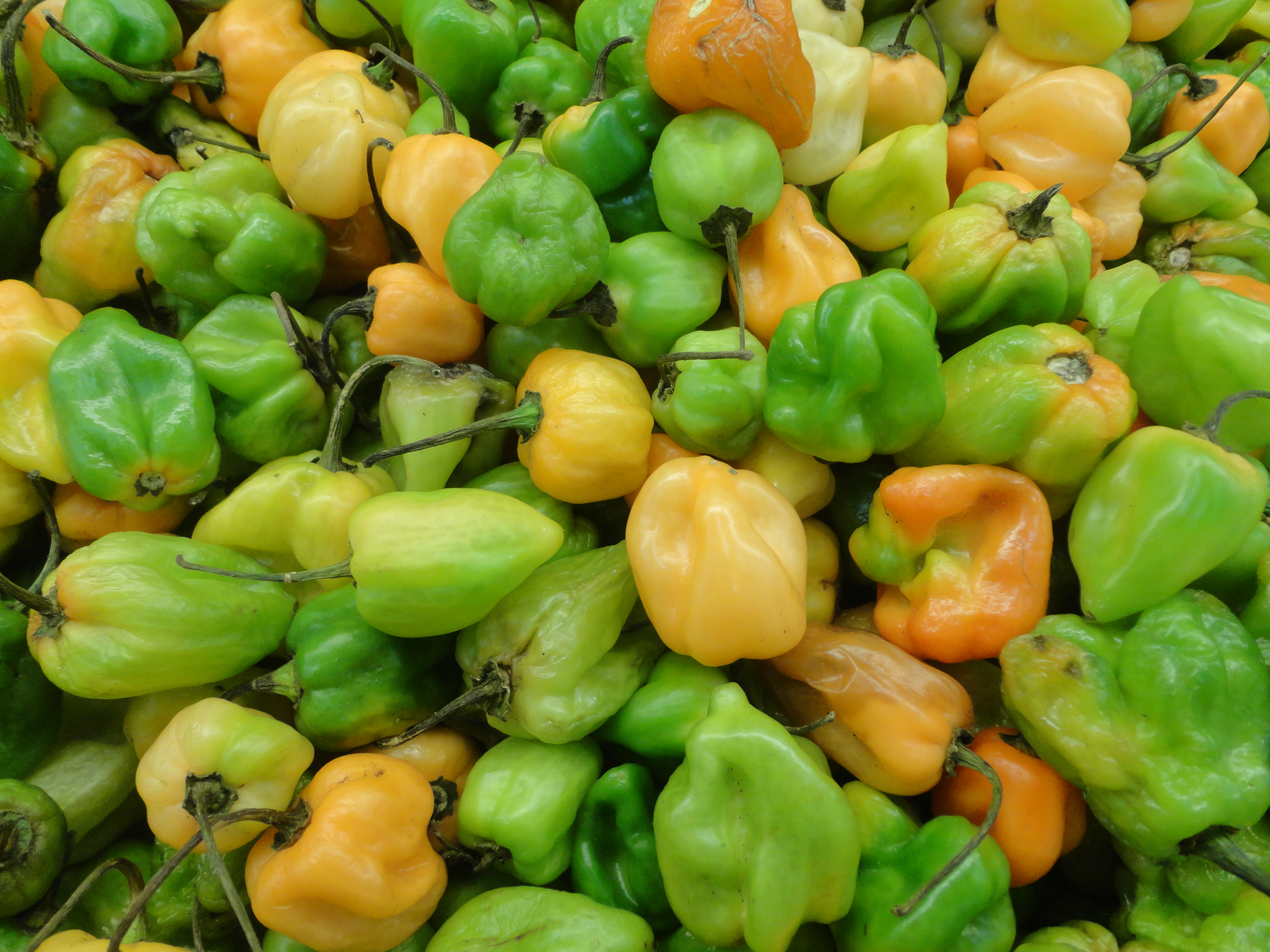 Chiles habaneros de diferentes colores